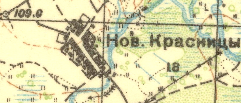 Топографическая карта Ленинградской области, квадрат О-35-23-В (Хотыницы), деревня Новые Красницы